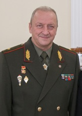 Начальник Генерального штаба – первый заместитель министра обороны Республики Беларусь генерал-майор Олег Белоконев